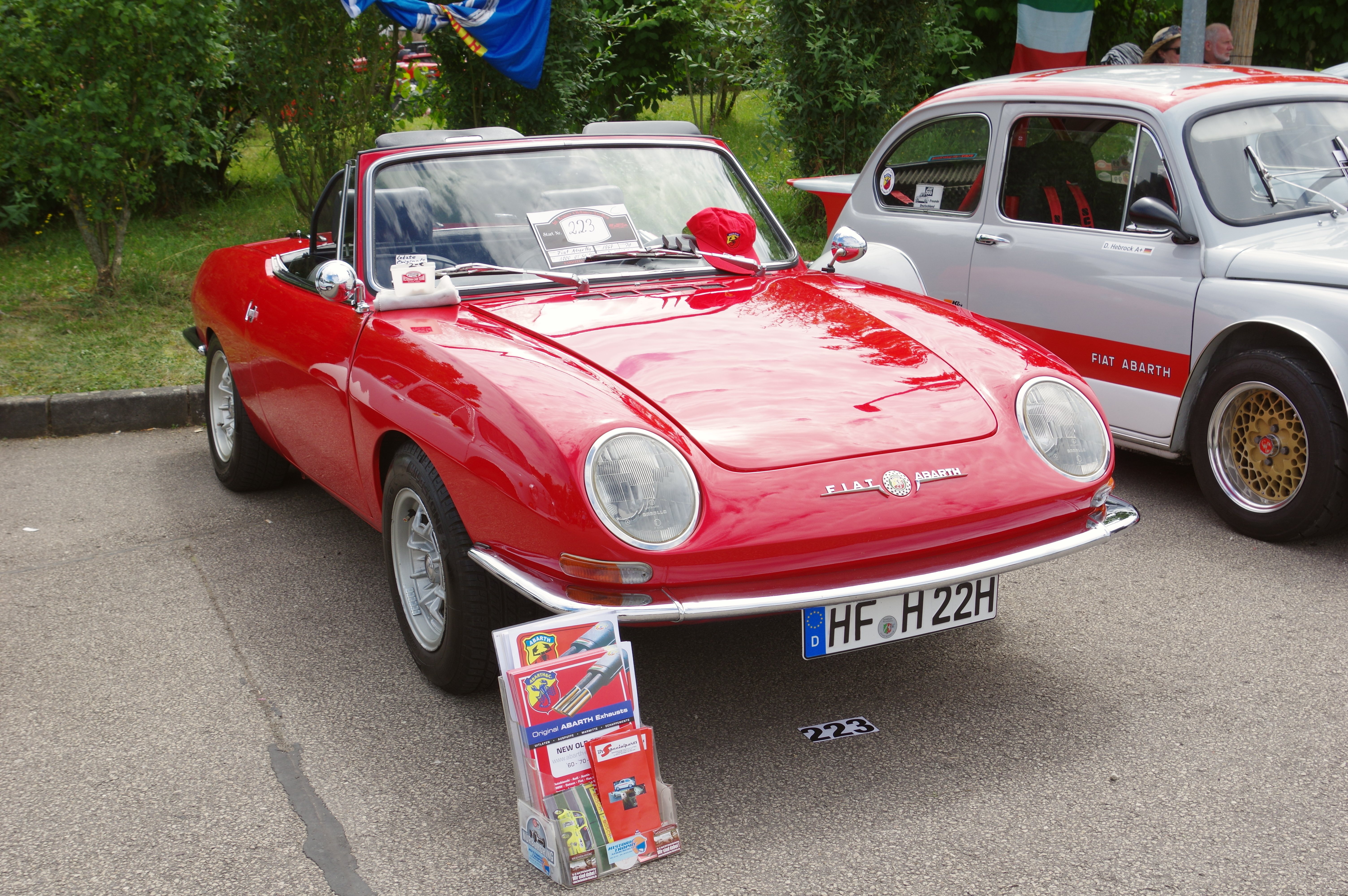 Fiat 850 spider - Abarth 1000, 1967, 70 PS, 32. Internationales Oldtimer Treffen Konz 2016, Das Nummernschild ist verfälscht!